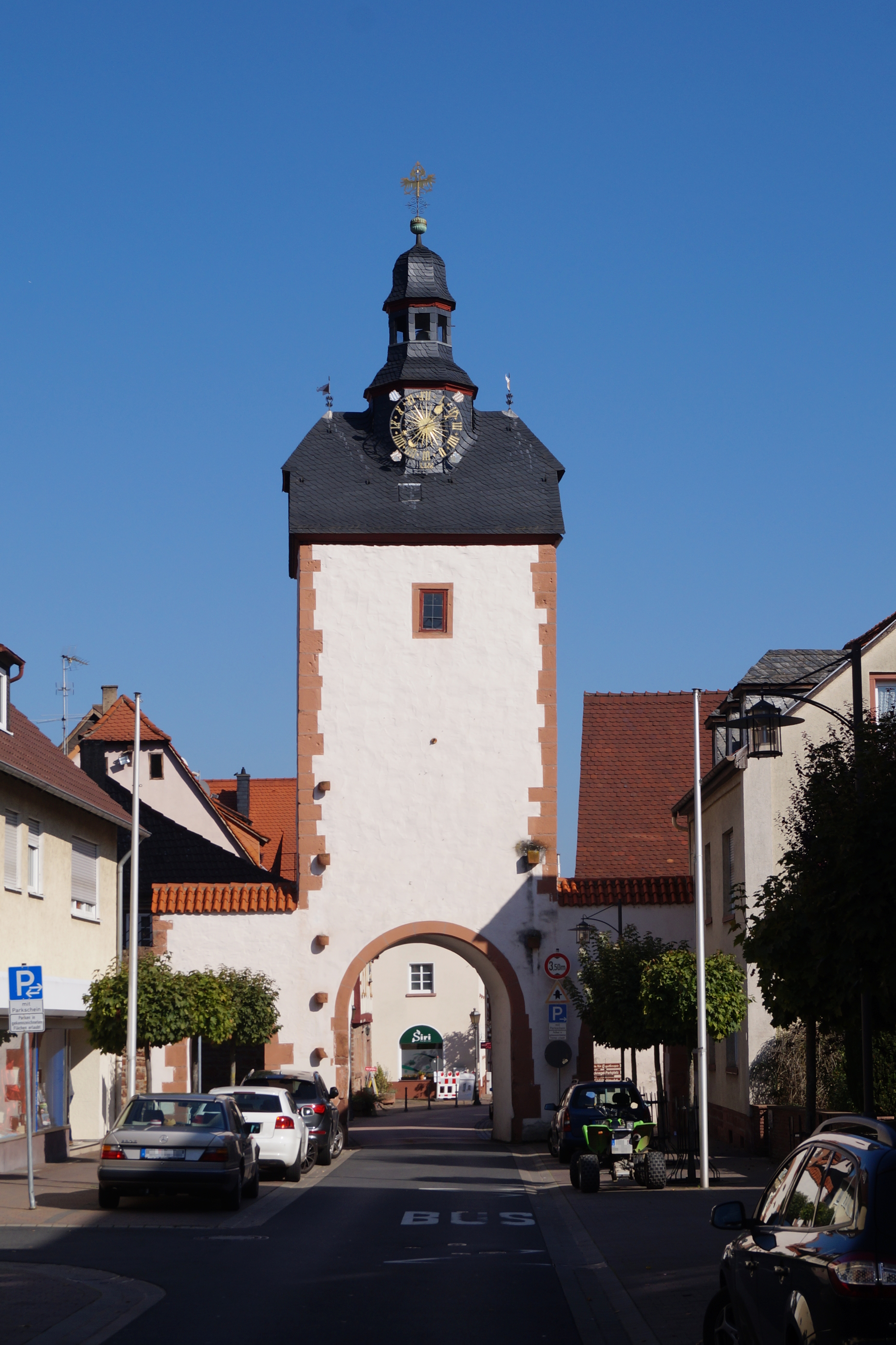 Oberes Tor, südliches Stadttor der hist. Altstadt von Obernburg am Main. Außenansicht von Südwesten 2015.